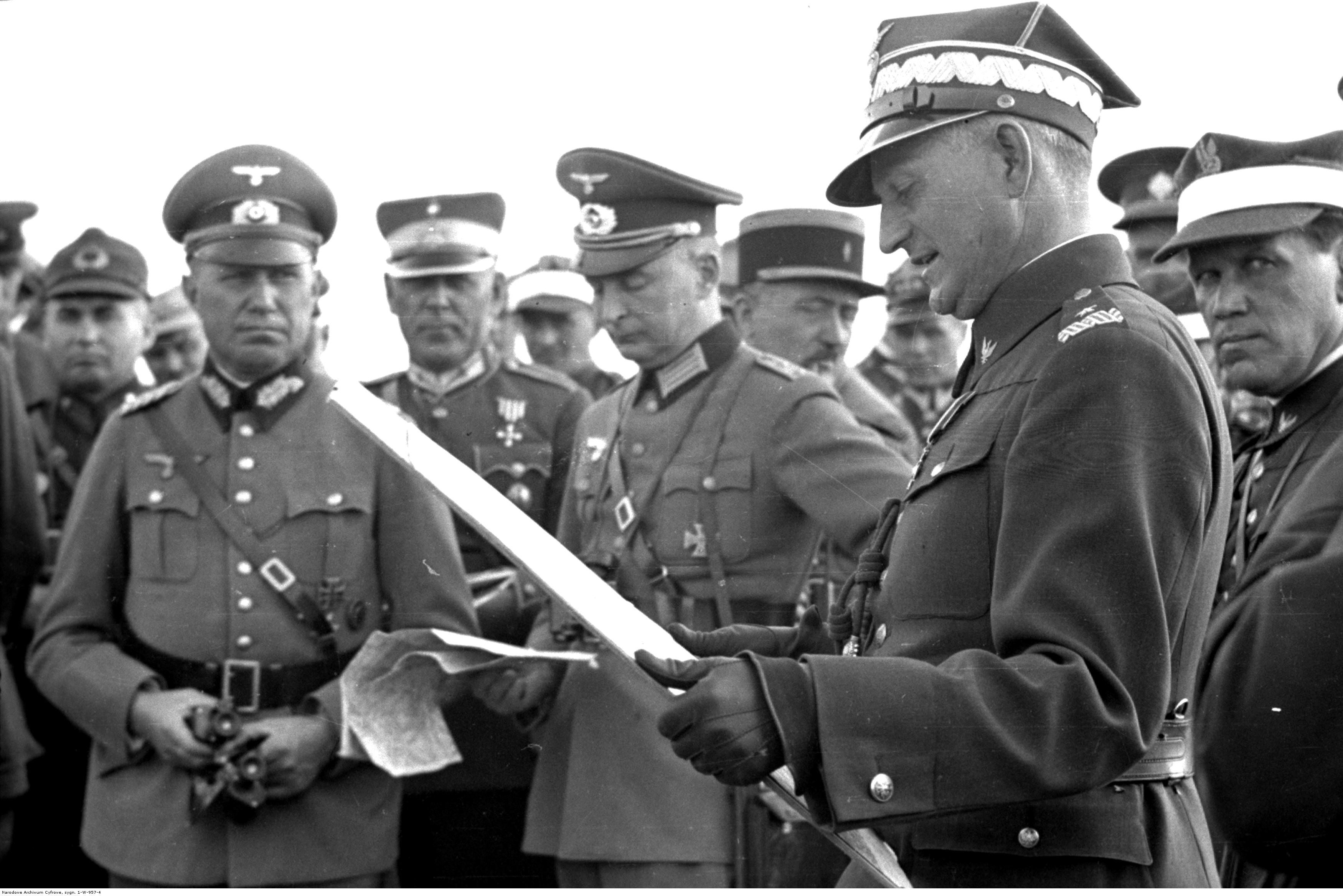 Manewry jesienne Wojska Polskiego pod Rzeszowem; wrzesień 1938. Dowódca OK V Kraków gen. bryg. Aleksander Narbutt-Łuczyński (trzyma mapę) w otoczeniu attaché wojskowych. Koncern Ilustrowany Kurier Codzienny - Archiwum Ilustracji. Sygnatura: 1-W-957-4